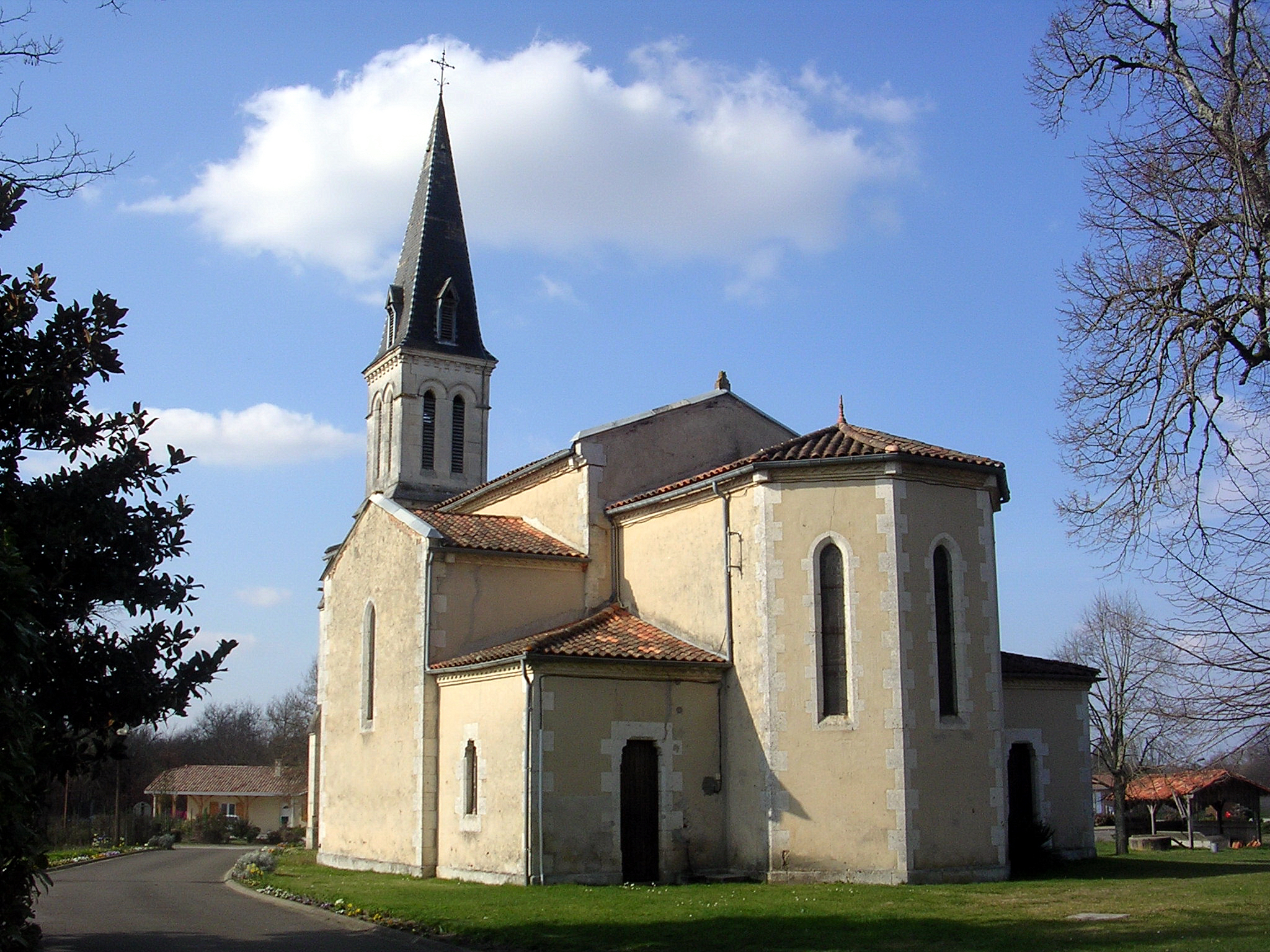 Eglise Saint-Pierre de Liposthey, dans le département français des Landes